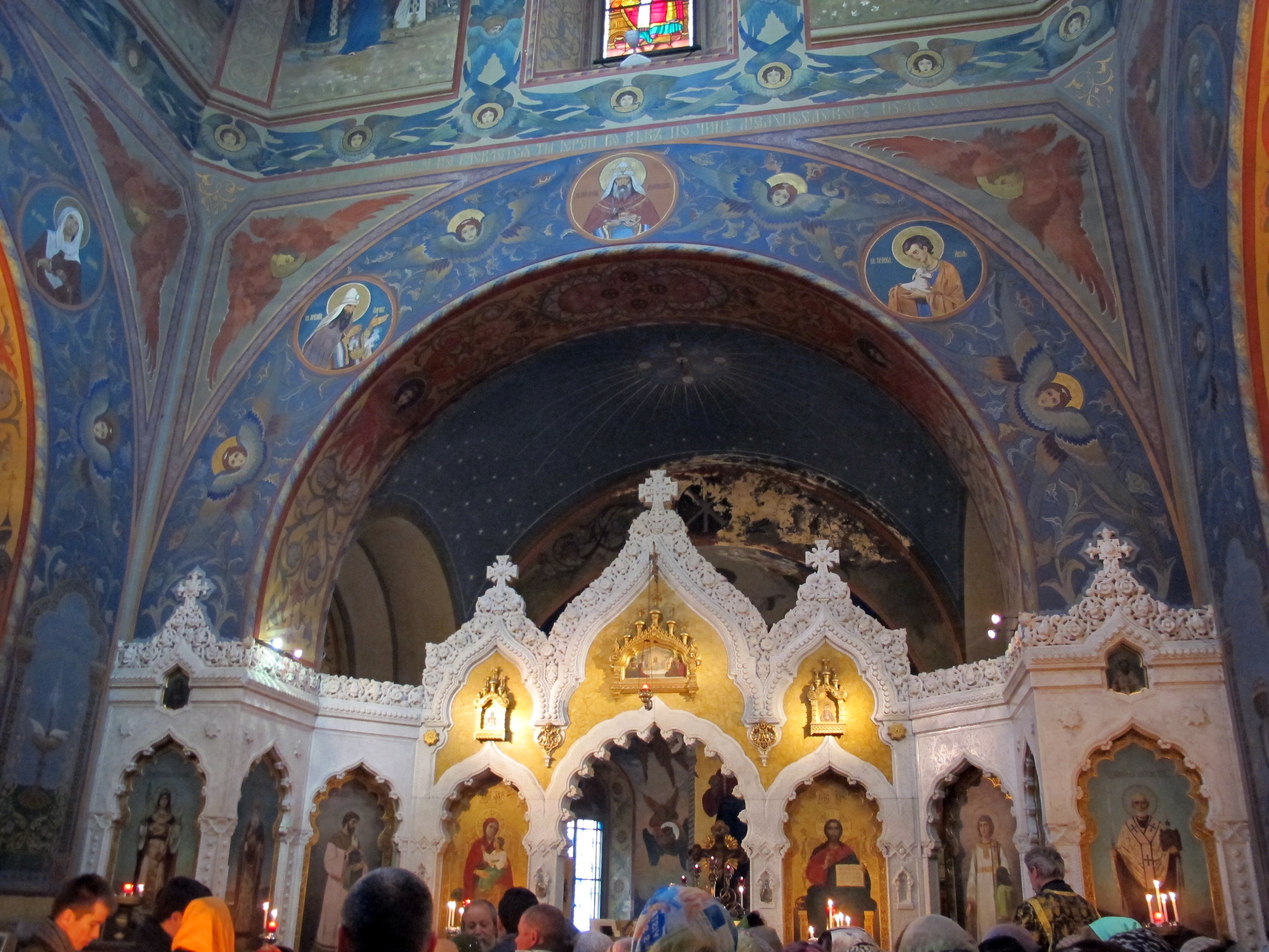 Chiesa russa di firenze, int